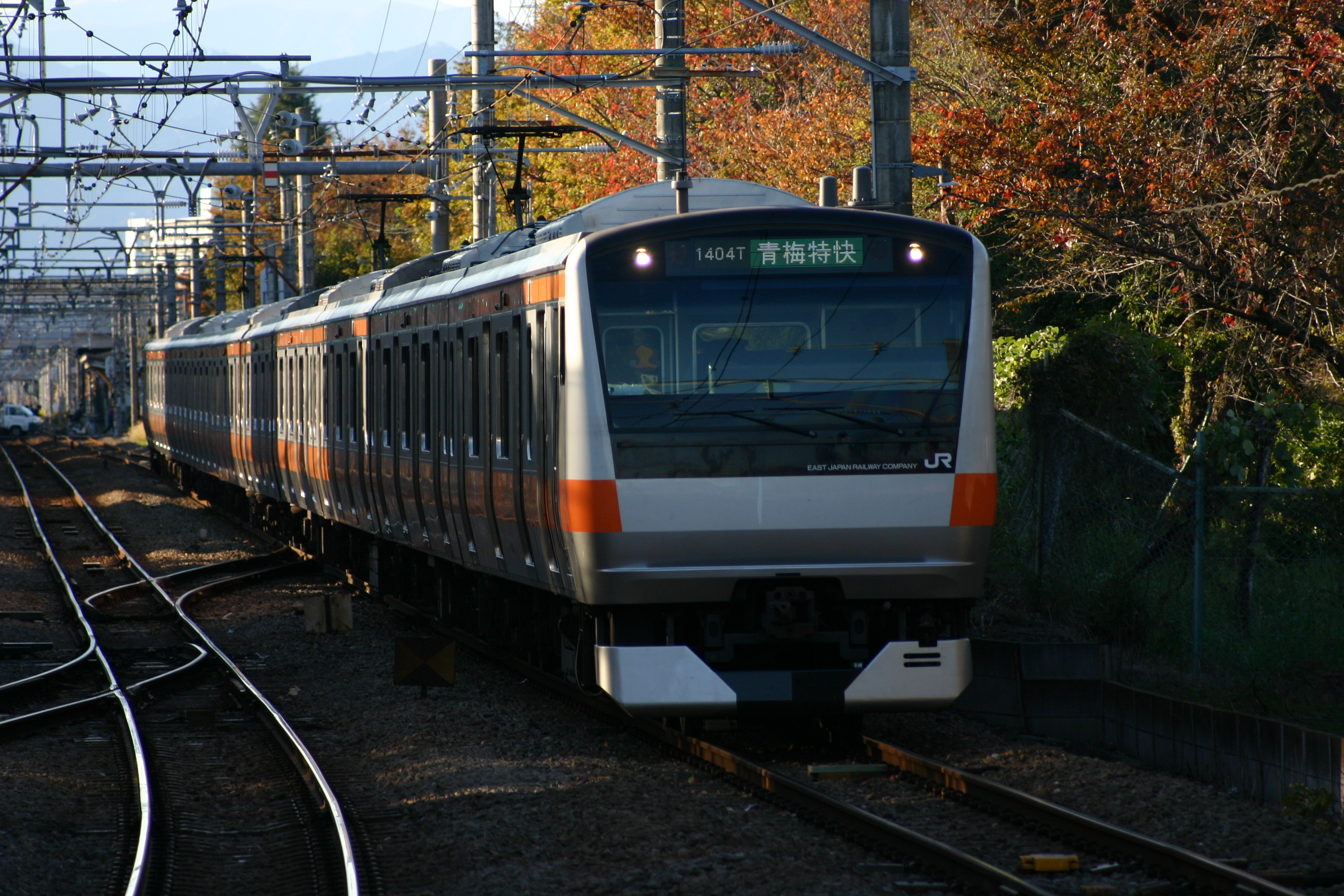 青梅特快のE233系。